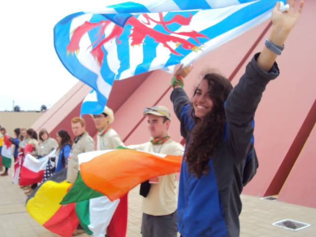 Expedicionarios en la Ruta Quetzal 2011 ante el Museo de Sipán, Perú